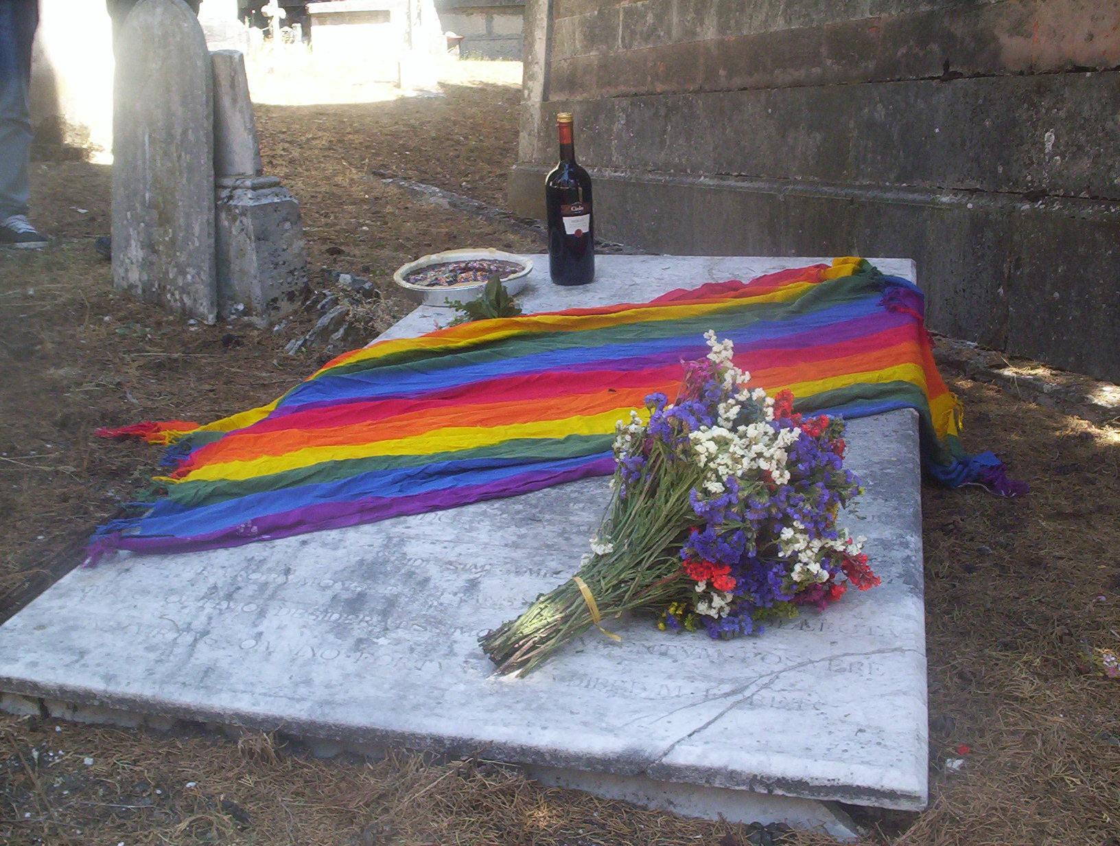 Ogni ultima domenica del mese di agosto, L' Associazione ‘Fondazione Luciano Massimo Consoli’ si riunisce insieme a tutti gli appartenenti alla Comunità GayLebicaTransQueer, le associazioni e le persone eterosolidali presso Cimitero Monumentale de L'Aquila [piazza Olivetani] per celebrare assieme il compleanno di Karl Einrich Ulrichs, nato il 28 agosto 1825, eroe della lotta di emancipazione e liberazione omosessuale, considerato il "Nonno Gay" del movimento di liberazione omosessuale mondiale. Attraverso letture ed interventi viene ricordato il suo incredibile coming-out, in occasione del suo 42° compleanno, probabilmente il più drammatico e coraggioso della storia GLBTQ, oltre che il primo di cui abbiamo notizia, che gli è costato persecuzioni, esilio, povertà. L'iniziativa prosegue ogni anno [da oltre venti anni] per rinnovare l'impegno a lottare concordemente assieme per far sì che l'omofobia, "antica idra irata" scompaia al più presto e definitivamente dal costume sociale.